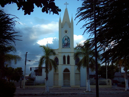 Igreja N. Srª da Lapa, Amélia Rodrigues, Bahia, Brasil